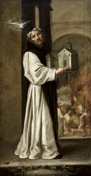 La obra representa a Fray Pedro Fernández Pecha (ca. 1326-1402), uno de los fundadores de la Orden de San Jerónimo y hermano también del religioso jerónimo Alfonso Fernández Pecha, que fue obispo de Jaén entre 1367 y 1368.